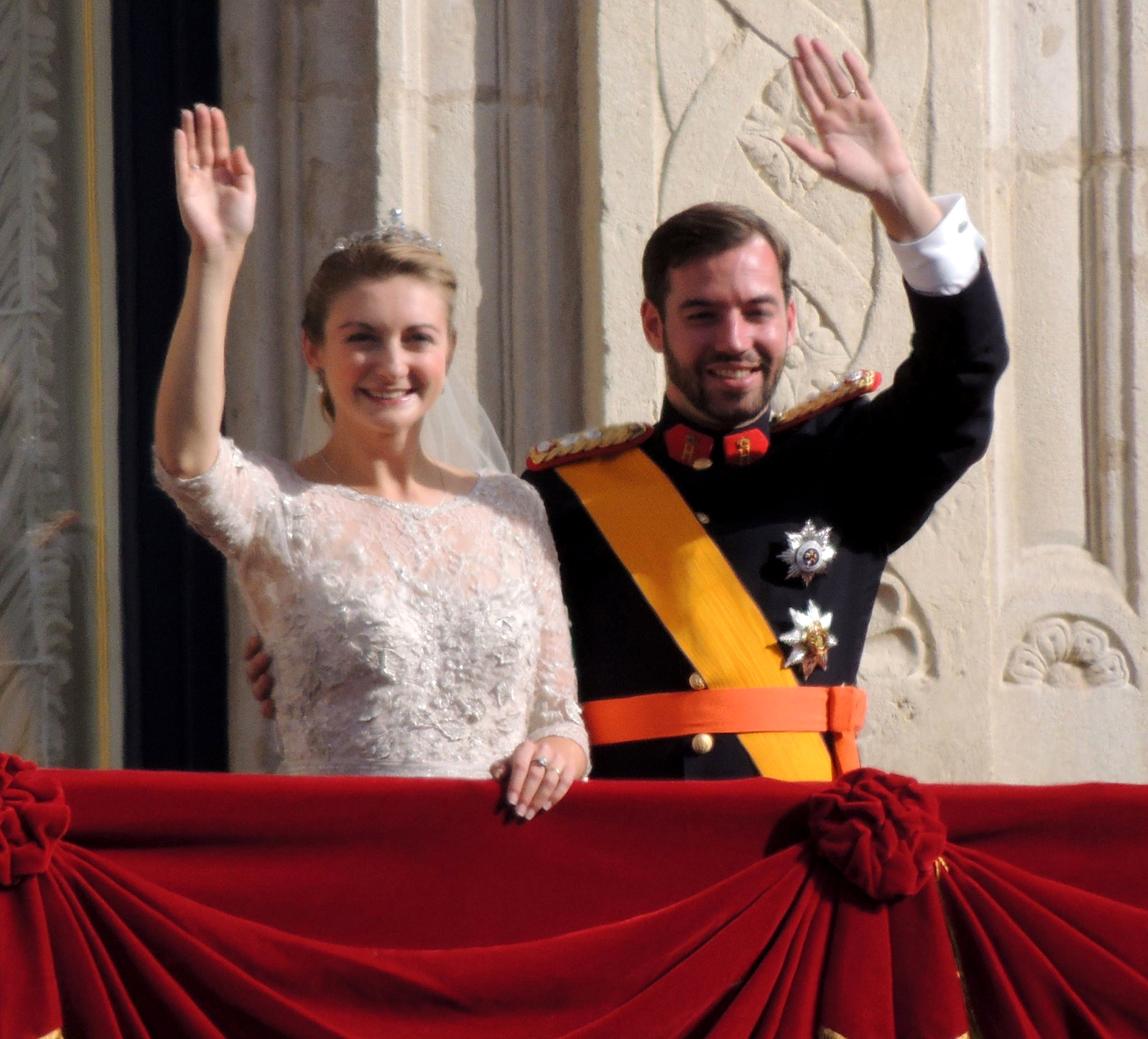 Den Ierfgroussherzog Guillaume an d'Stéphanie vu Lëtzebuerg, Prënzekanner déi sech fonnt hunn.